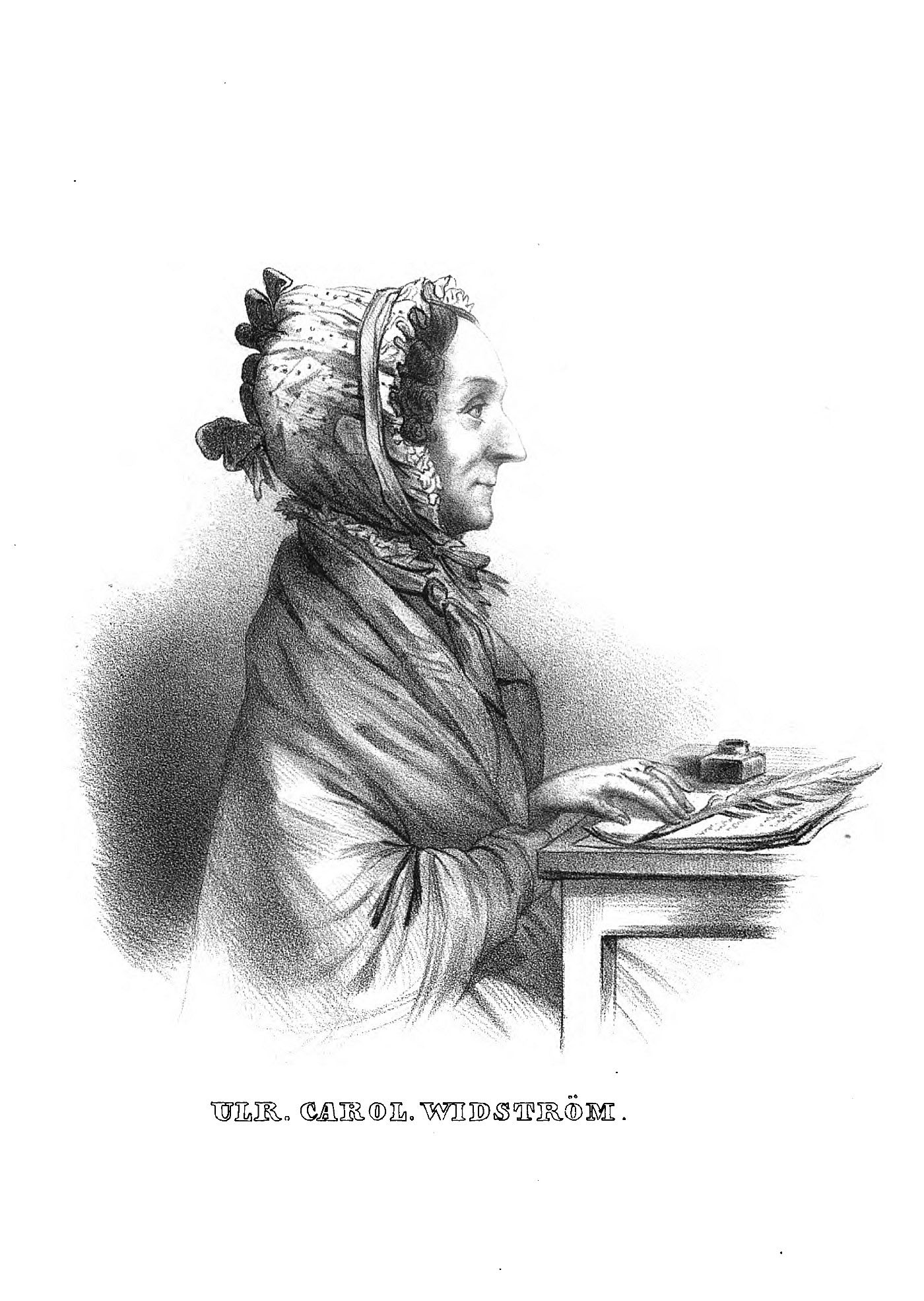 Ulrika Carolina Widström, född 24 november 1764, död 19 februari 1841, svensk poet och översättare.